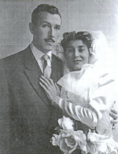 Foto de casamento de Tito Lívio Fleury Martins e Cacilda Becker. Aparecida do Norte, SP, 15 de março de 1947.